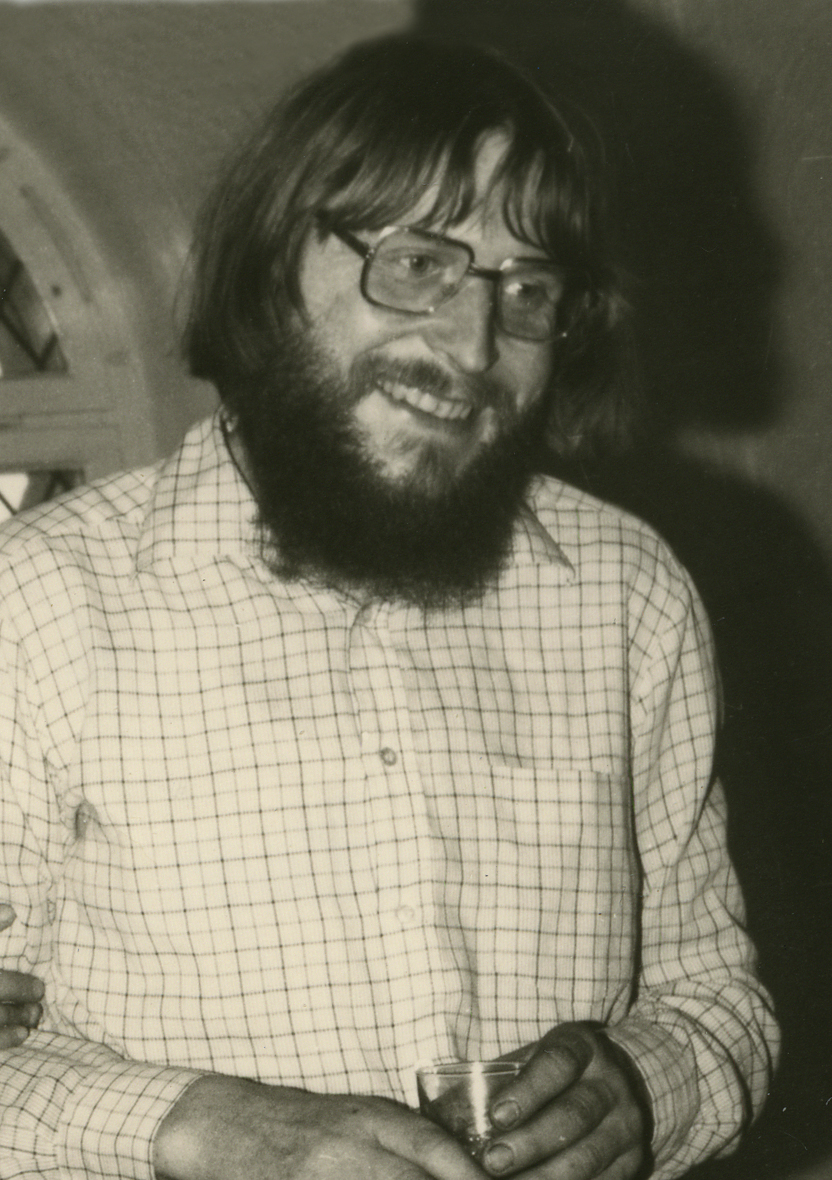 Digitalisat eines Fotos Helfried Kämpfes